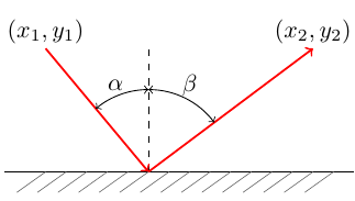 Skica k izpeljavi odboja na ravnem zrcalu.